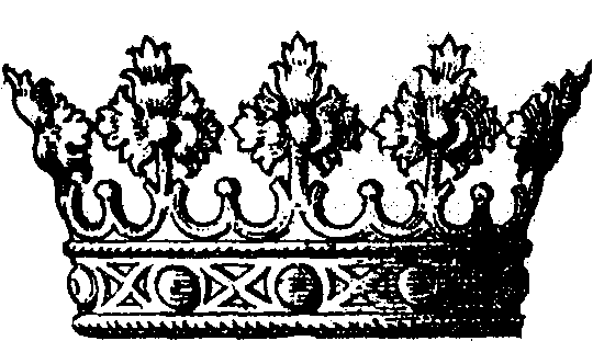 "Fig. 5. Herzogskrone in Frankreich, Italien, Spanien und Portugal. Einfacher Stirnreif mit fünf Blattzinken, zwischen denen kleine Zinken eingesetzt sind."